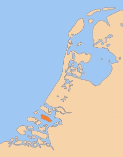 La région vers 1350. Overflakkee en orange